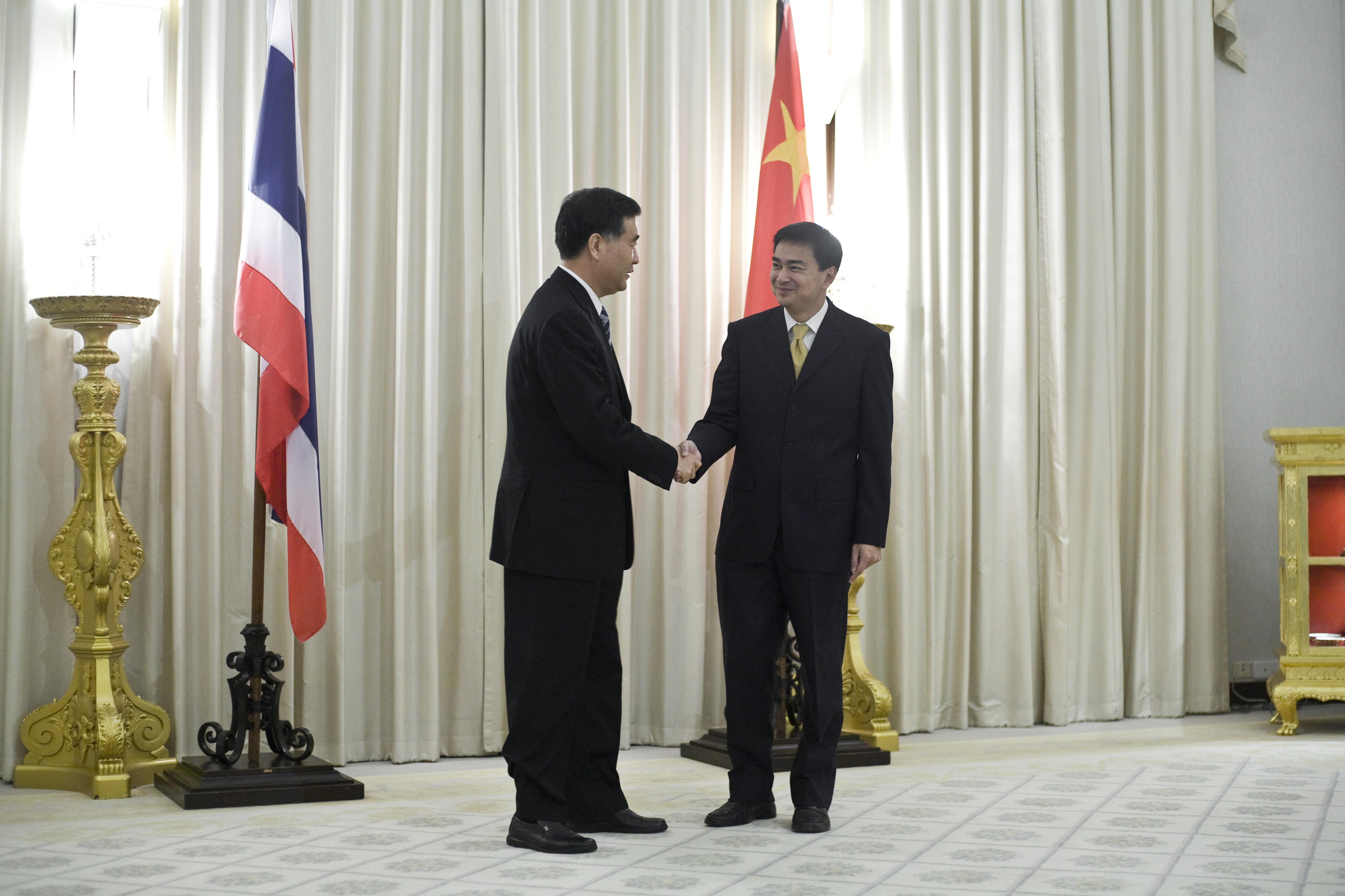 Mr. Wang Yang เลขาธิการพรรคคอมมิวนิสต์มณฑลกวางตุ้ง เข้าเยี่ยมคารวะนายกรัฐมนตรี ณ ห้องสีงาช้าง ตึกไทยคู่ฟ้า ทำเนียบรัฐบาล 9พฤศจิกายน2552 (The Official Site of The Prime Minister of Thailand Photo by พีรพัฒน์ วิมลรังครัตน์)